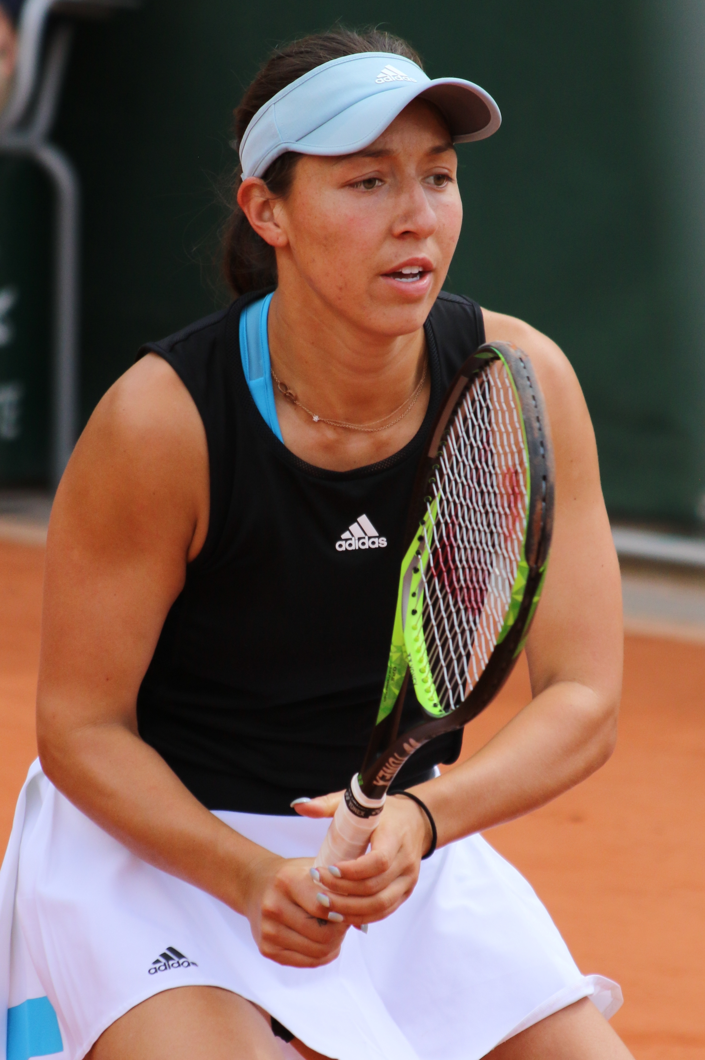 Pegula RG19 (23)